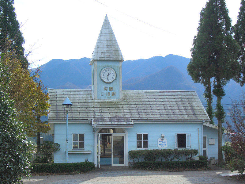 南阿蘇鉄道 阿蘇白川駅 撮影者/著作者/著作権保有者 : MK Products (本人がアップロード) 撮影日 : 2006/11/21 阿蘇白川駅用にアップロードした画像です。良い画像があれば別の画像に変えてください。